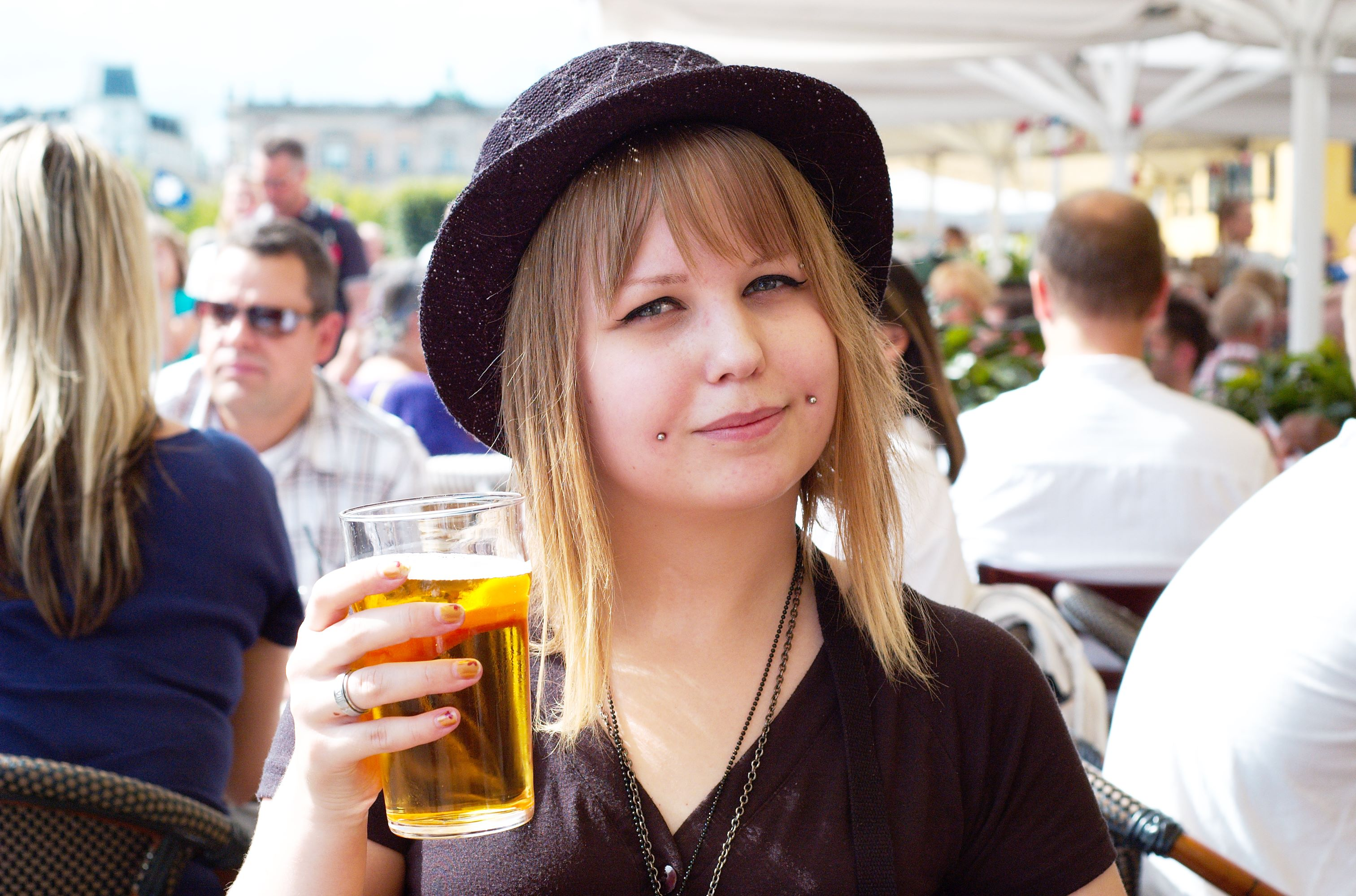 Genki 2010